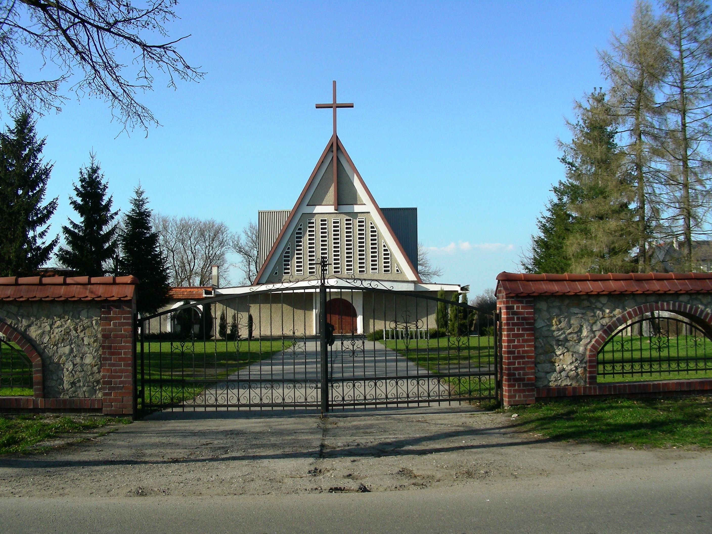 Kościół św. Maksymiliana Marii Kolbego, Magnuszowice, gmina Niemodlin, powiat opolski, województwo opolskie